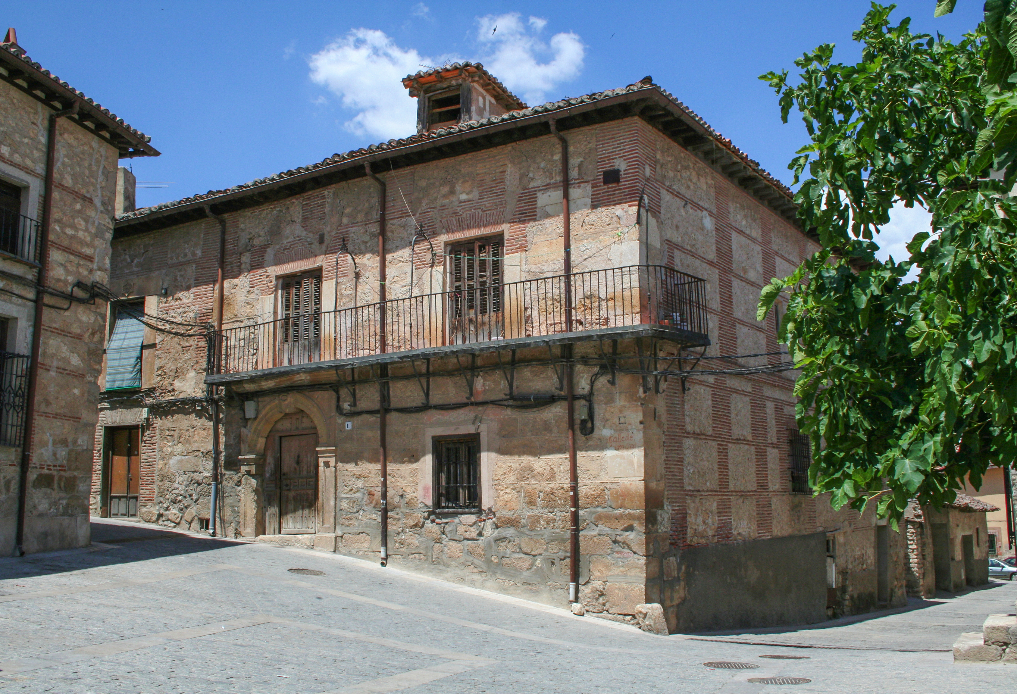 Plaza de la Montera - Villa de Torrelaguna (Madrid)